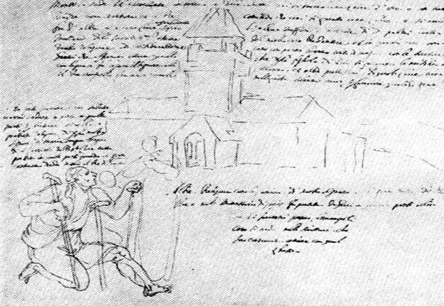 ბედიის ტაძარი კასტელი (დონ კრისტოფორო დე კასტელი – სამეგრელოს ნახატები » 450 ილორის ტაძარი კასტელი)